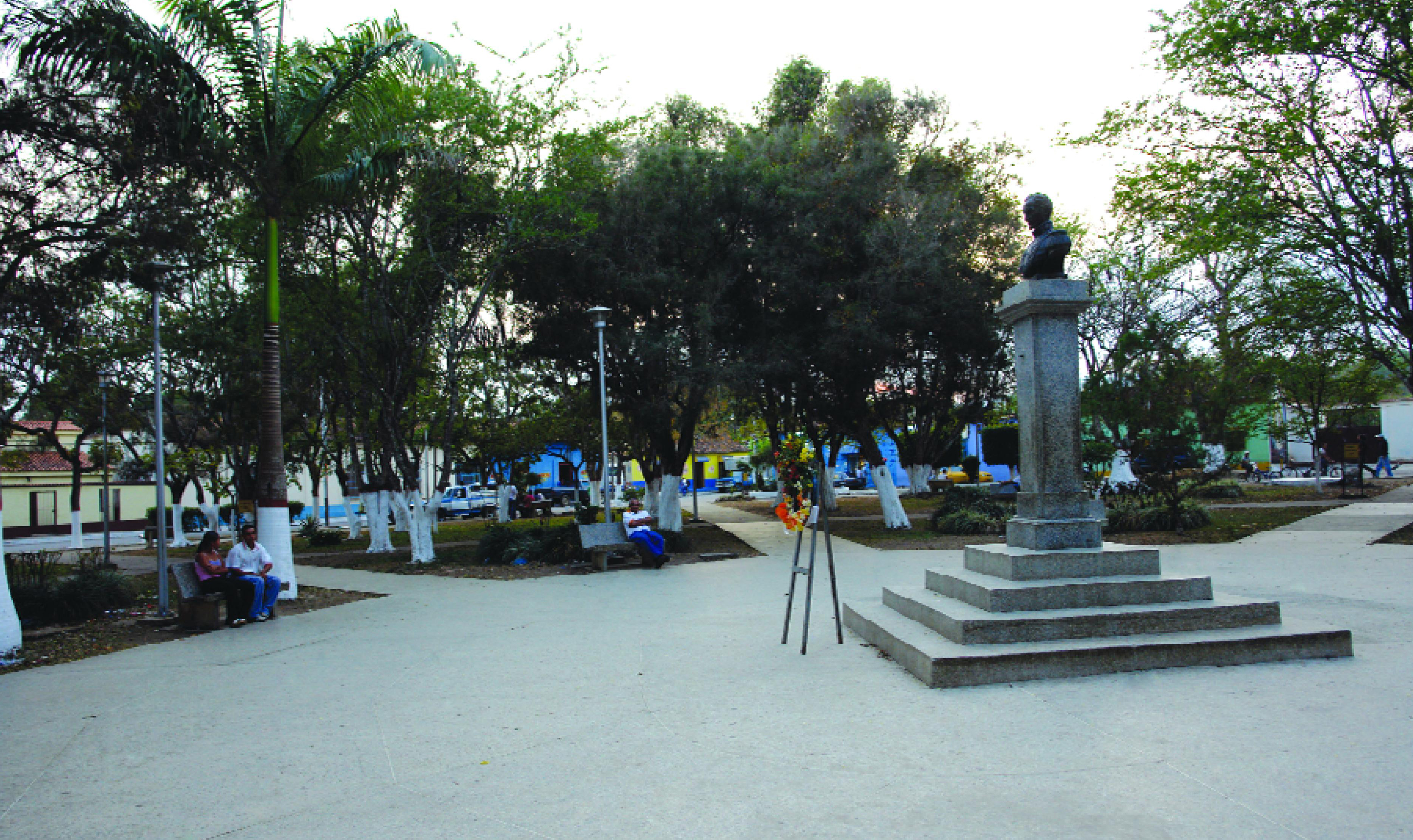 vista de la estatua de Simon Bolivar en el centro de la plaza bolivar de salom